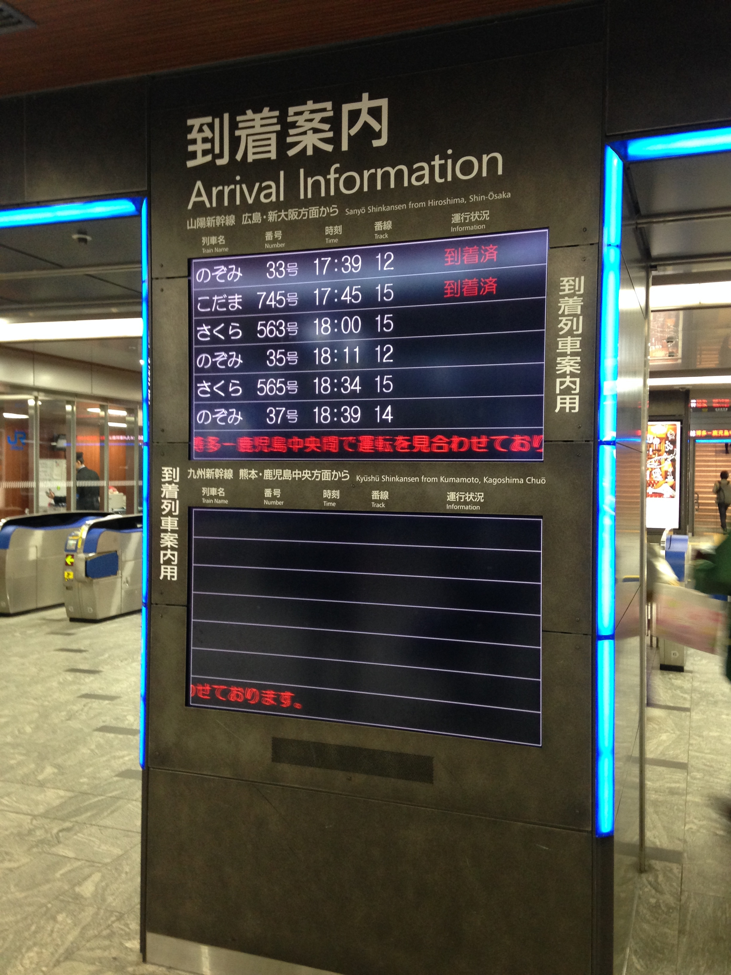 博多駅(山陽・九州新幹線)の到着案内。熊本・鹿児島中央方面は運転を見合わせた